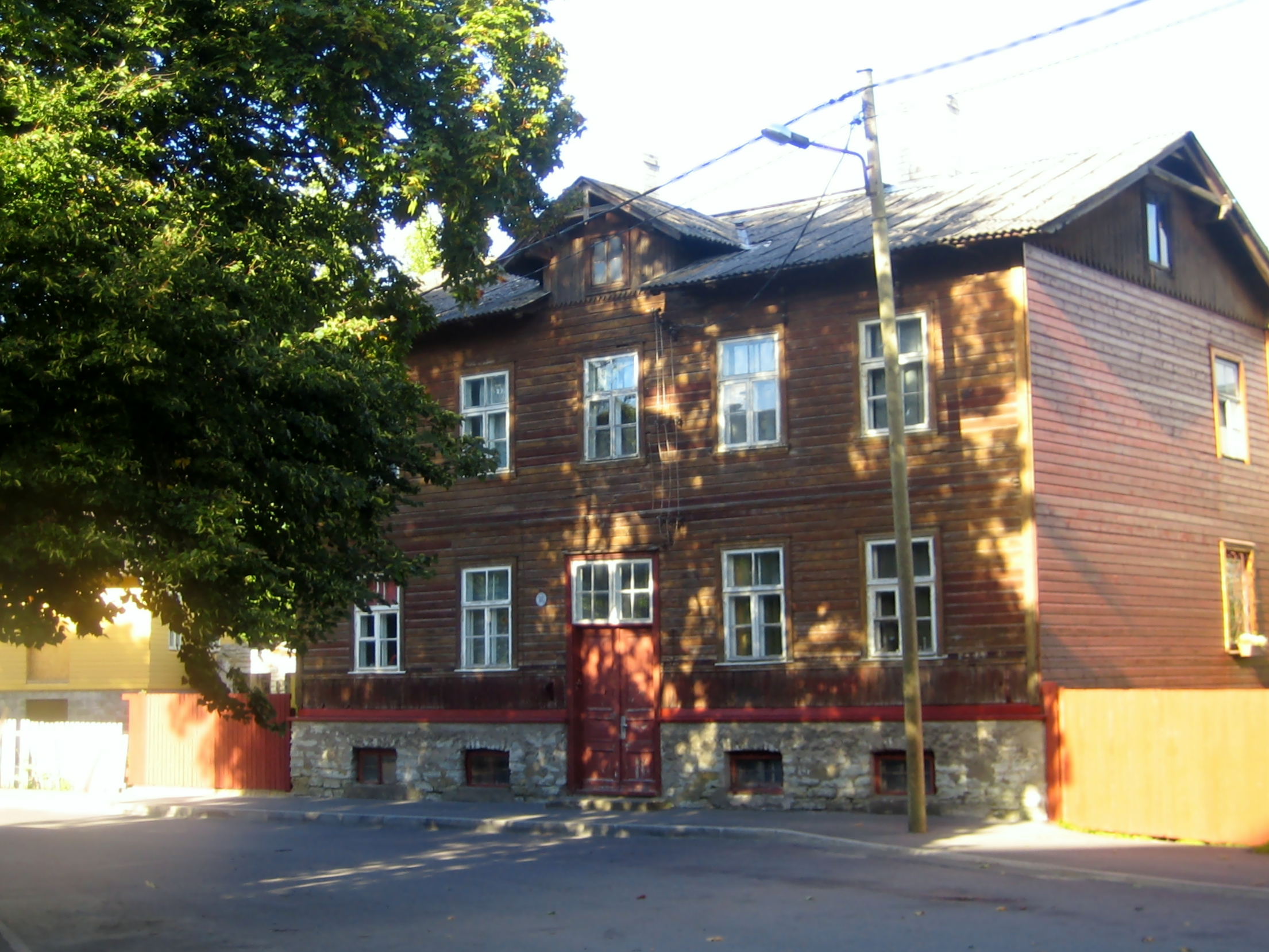 Puitelamu Kivimurru 30/Paekivi 3